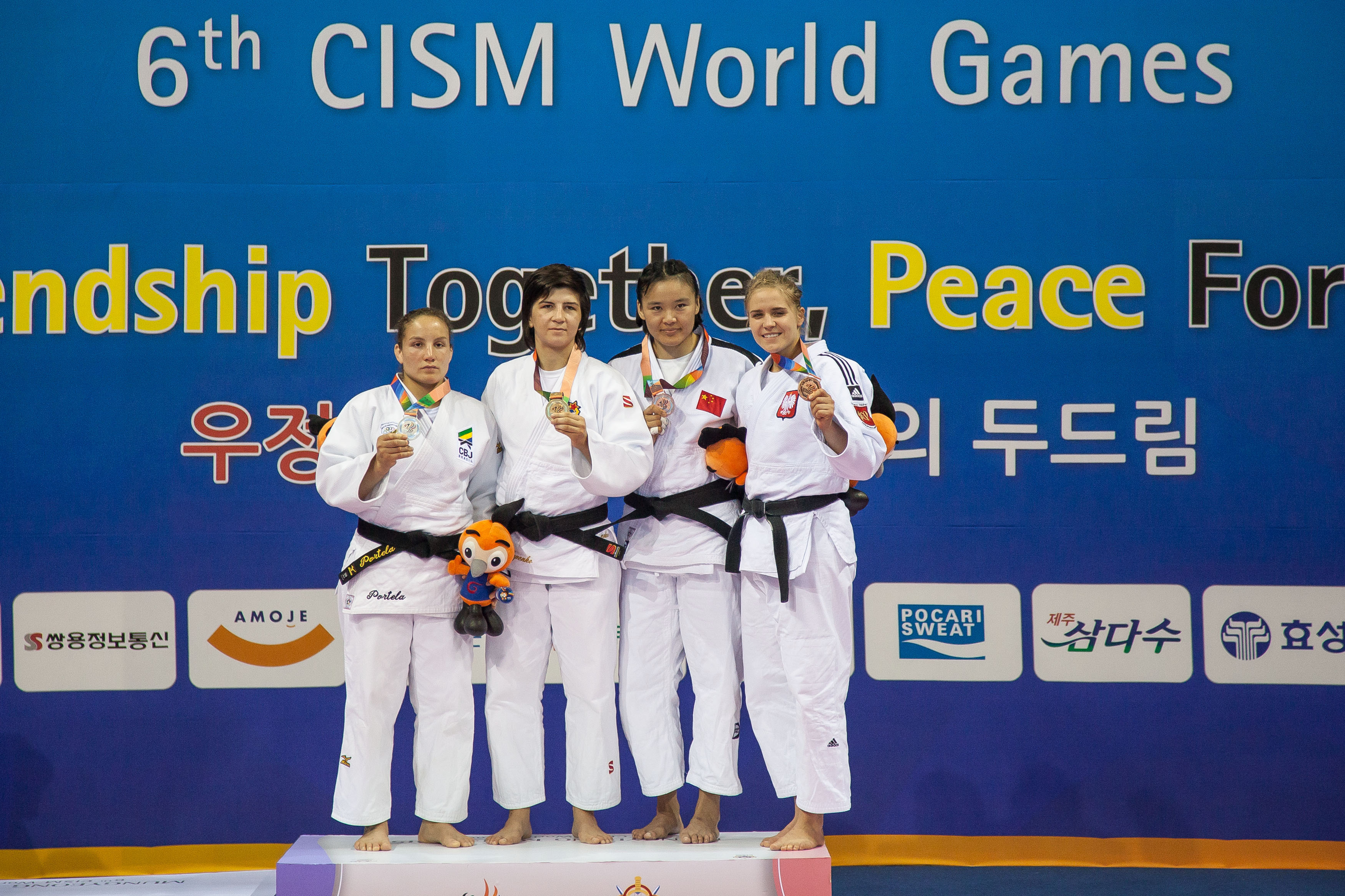 Maria Portela conquista uma medalha de prata para o Brasil no judô individual. Foto: Sgt Johnson Barros (l-r: Maria Portela, Alena Prokopenko, Zi Yan, Karolina Talach)